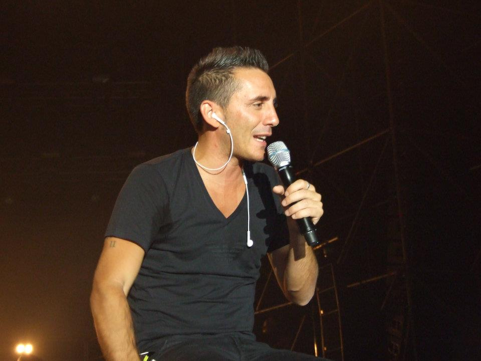 Opera propria